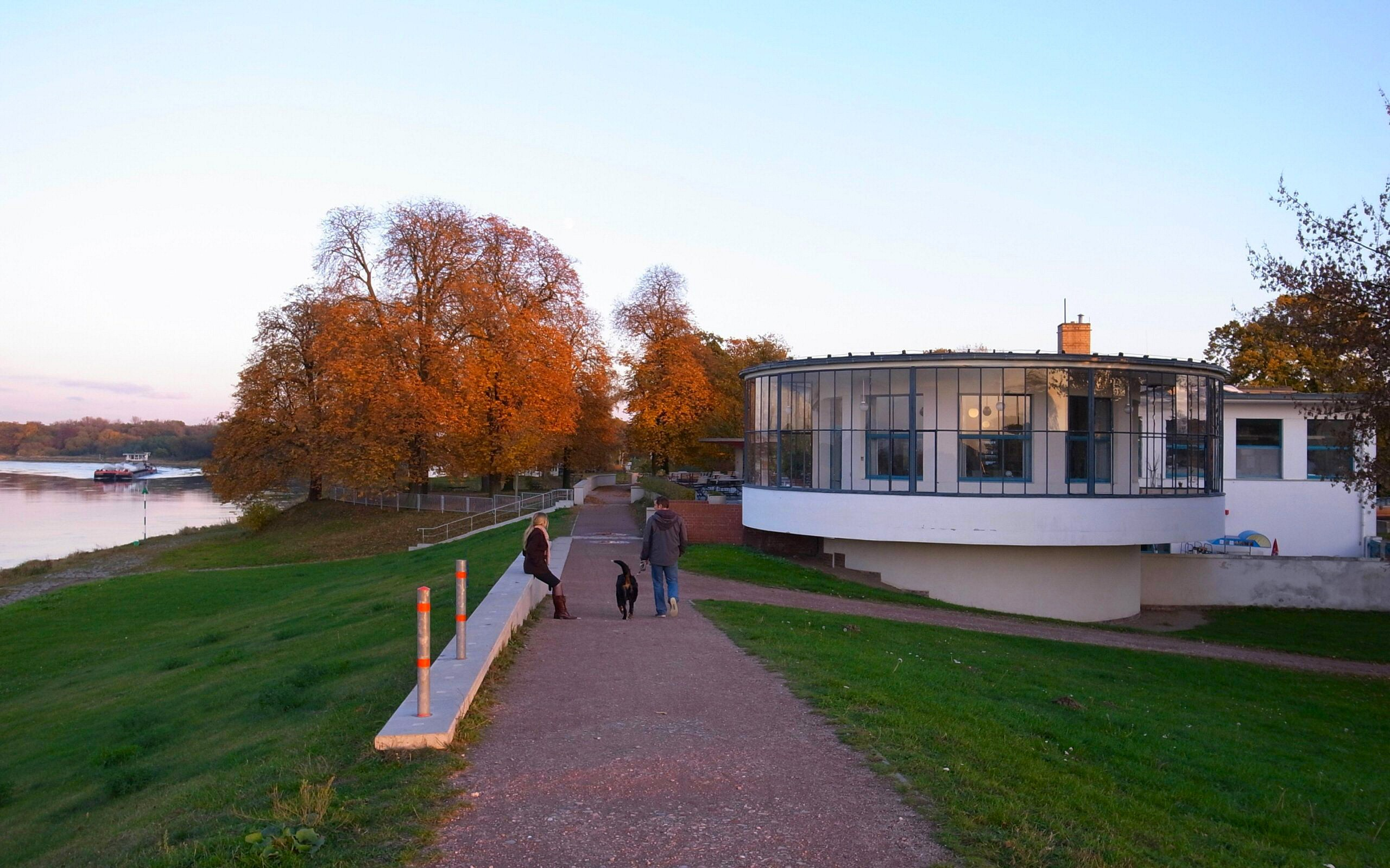 Kornhaus Dessau an der Elbe